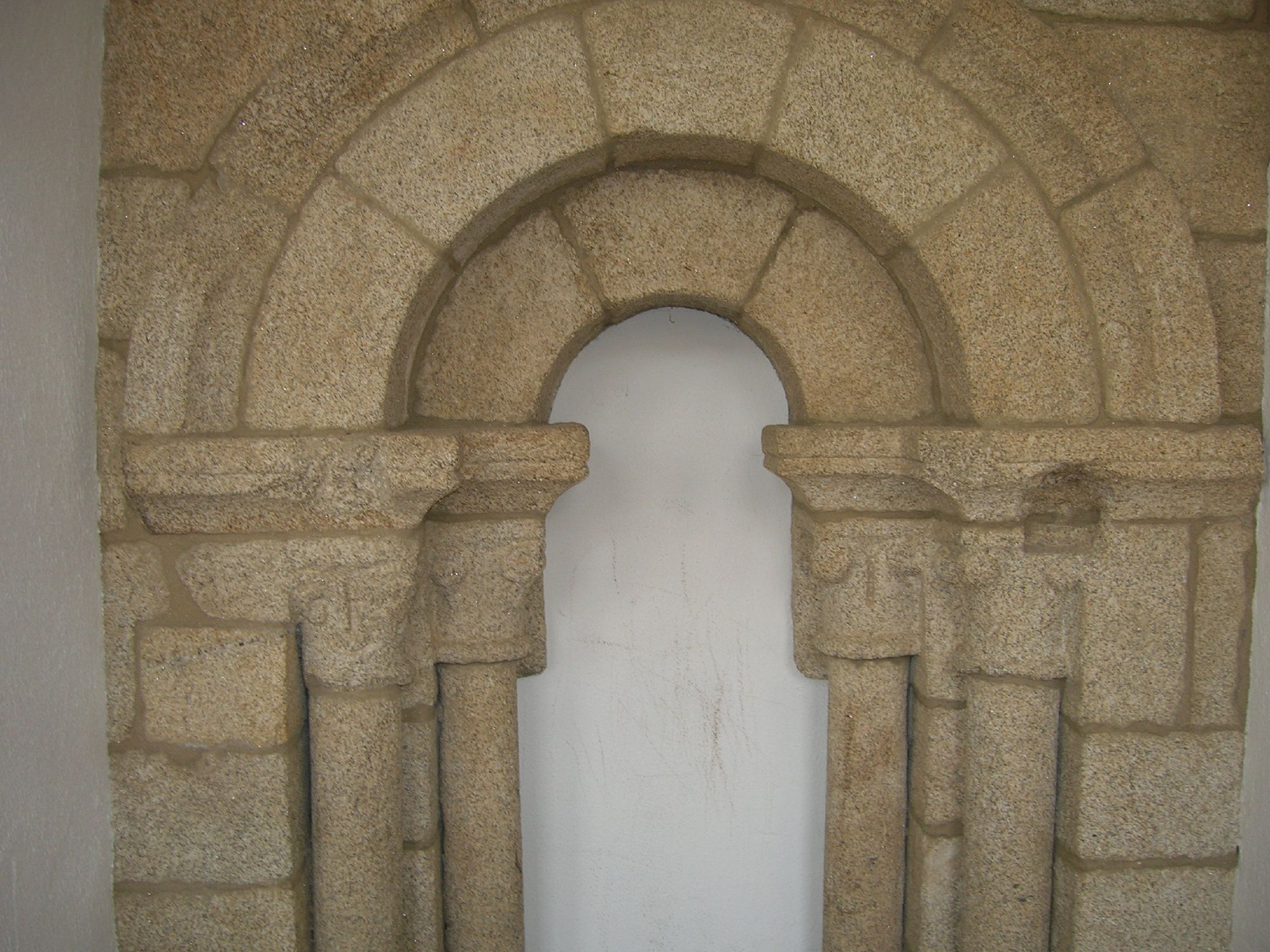 Monasterio de Montederramo. Esta ventana románica, fue encontrada en las últimas obras de restauración del monasterio. Está situada en el muro sur de la iglesia, en la galería superior del claustro, y pertenecía a la primitiva iglesia románica.